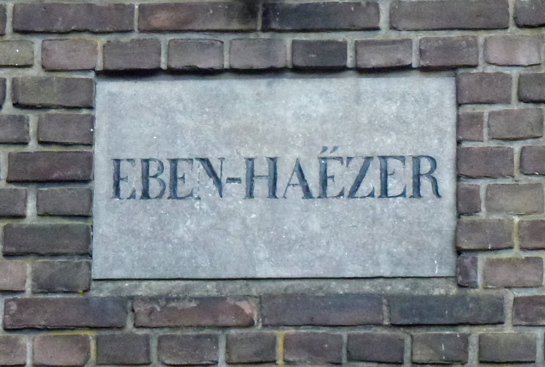 Gevelsteen met de tekst Eben-Haëzer. De Turfmarkt kerk is in slechte staat en wordt afgebroken.